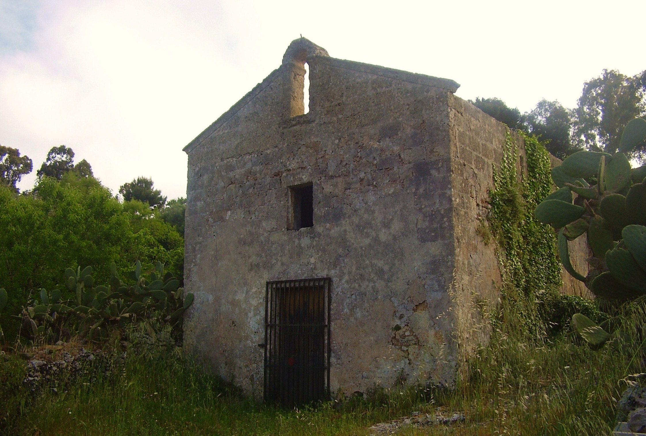 Chiesa Madonna de lu Ritu Presicce